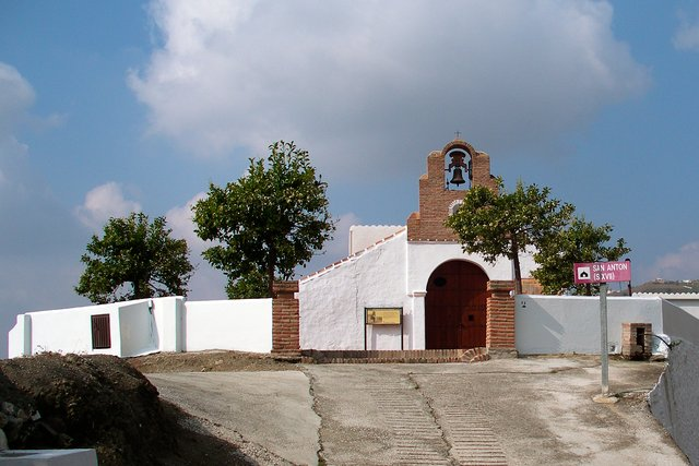 Ermita de San Anton, en Canillas de Albaida